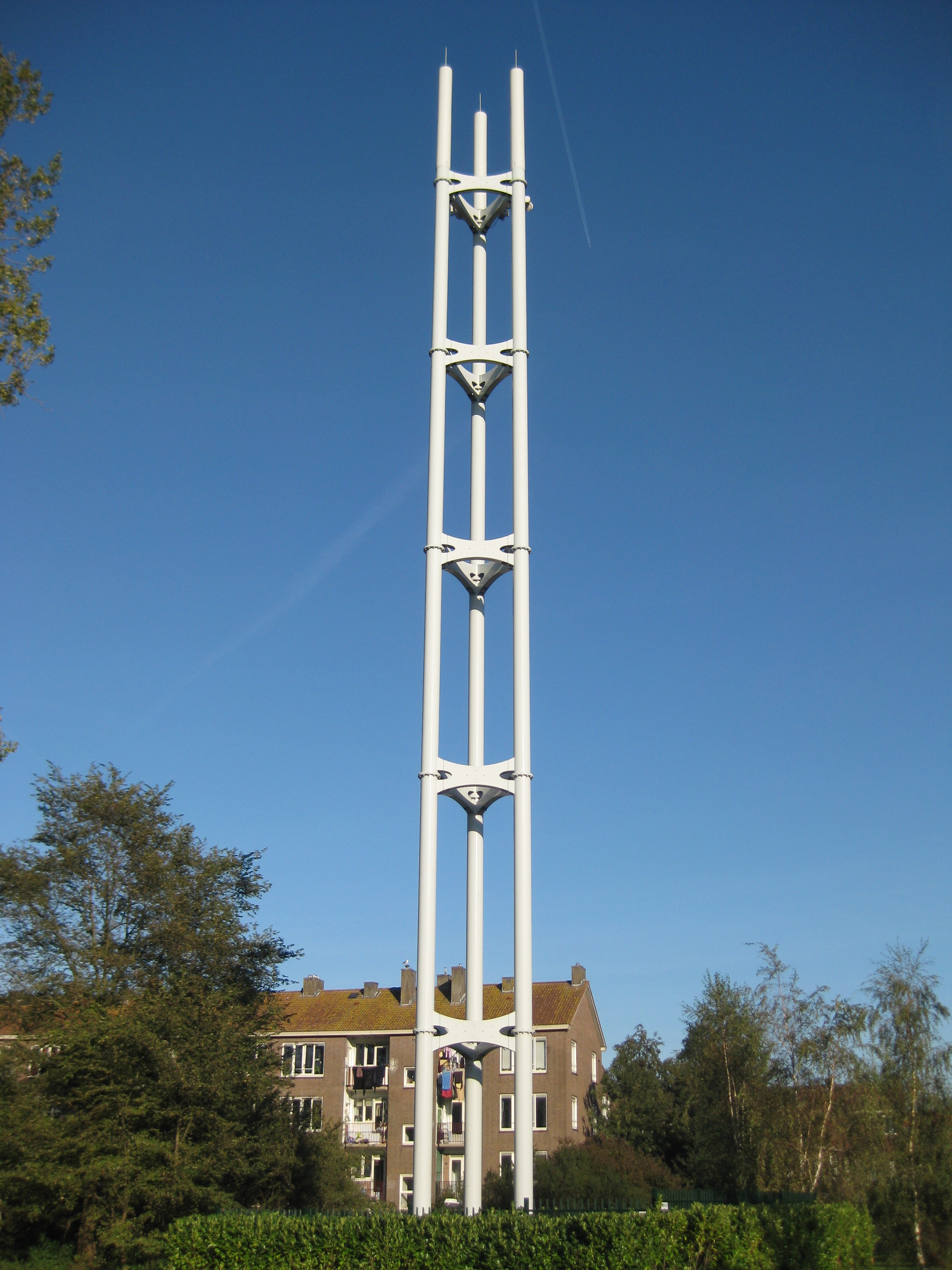 UMTS mast aan de Burgemeester Roëlstraat in Amsterdam-West